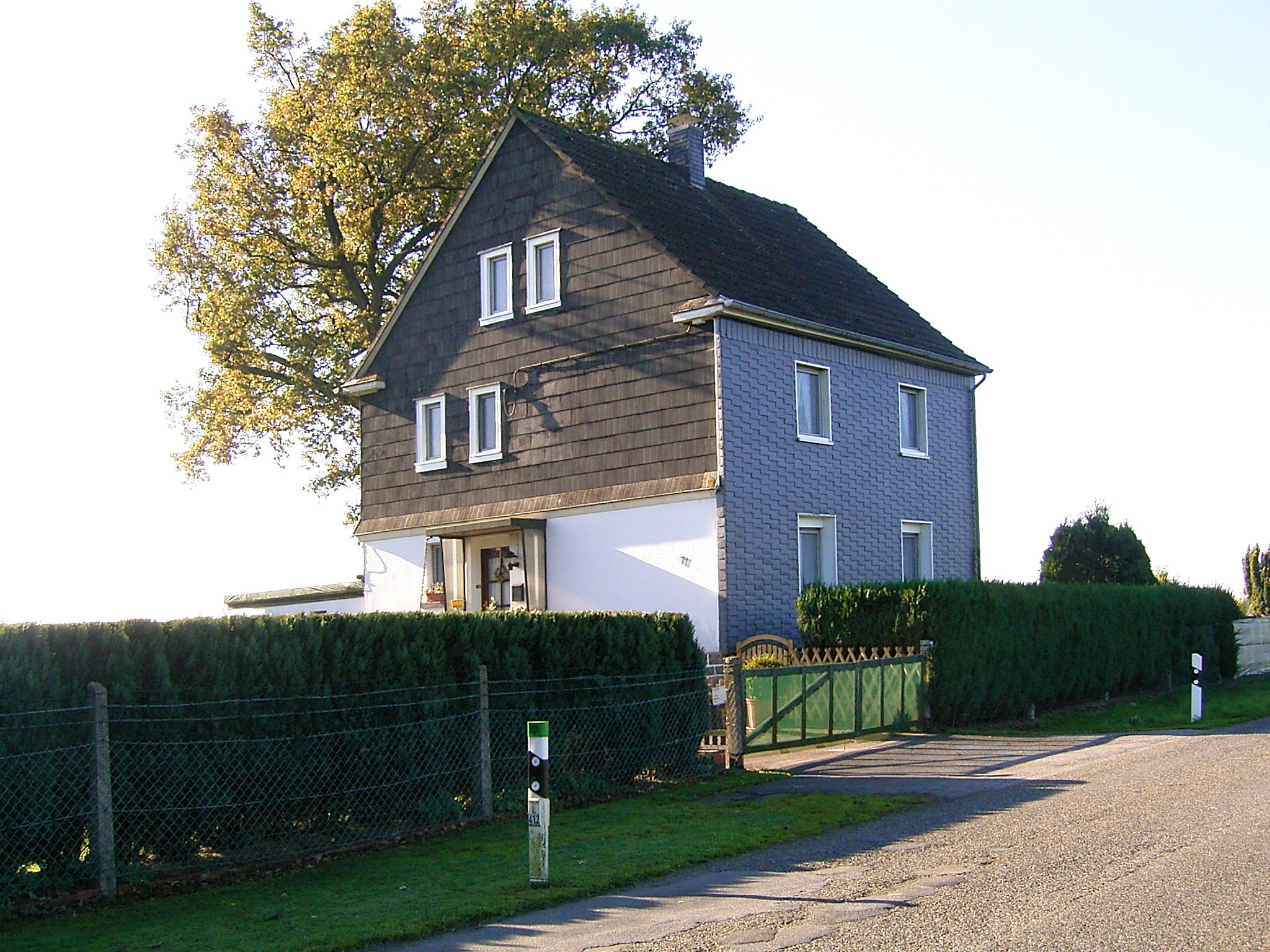 Radevormwald